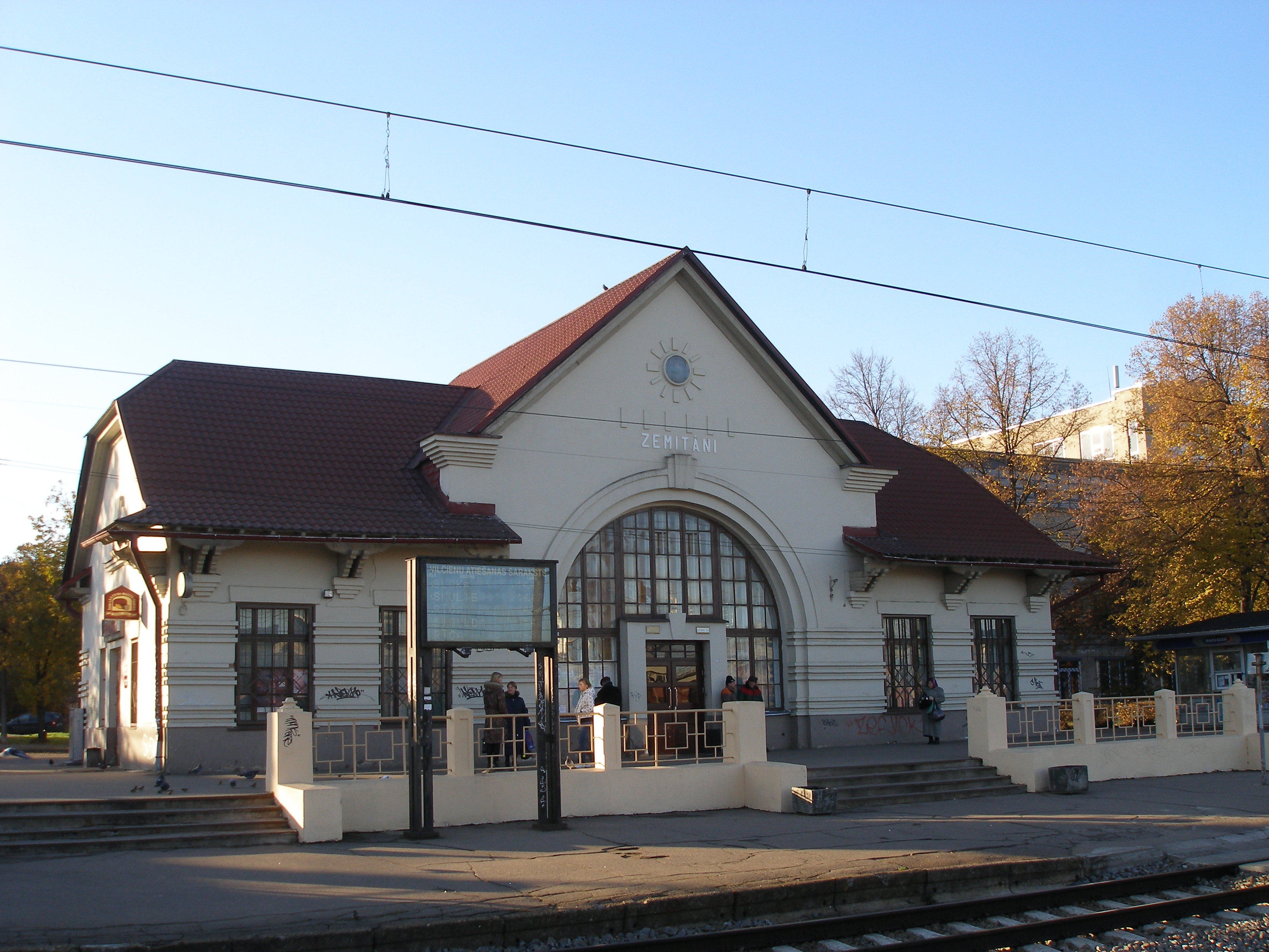 Станция Земитаны